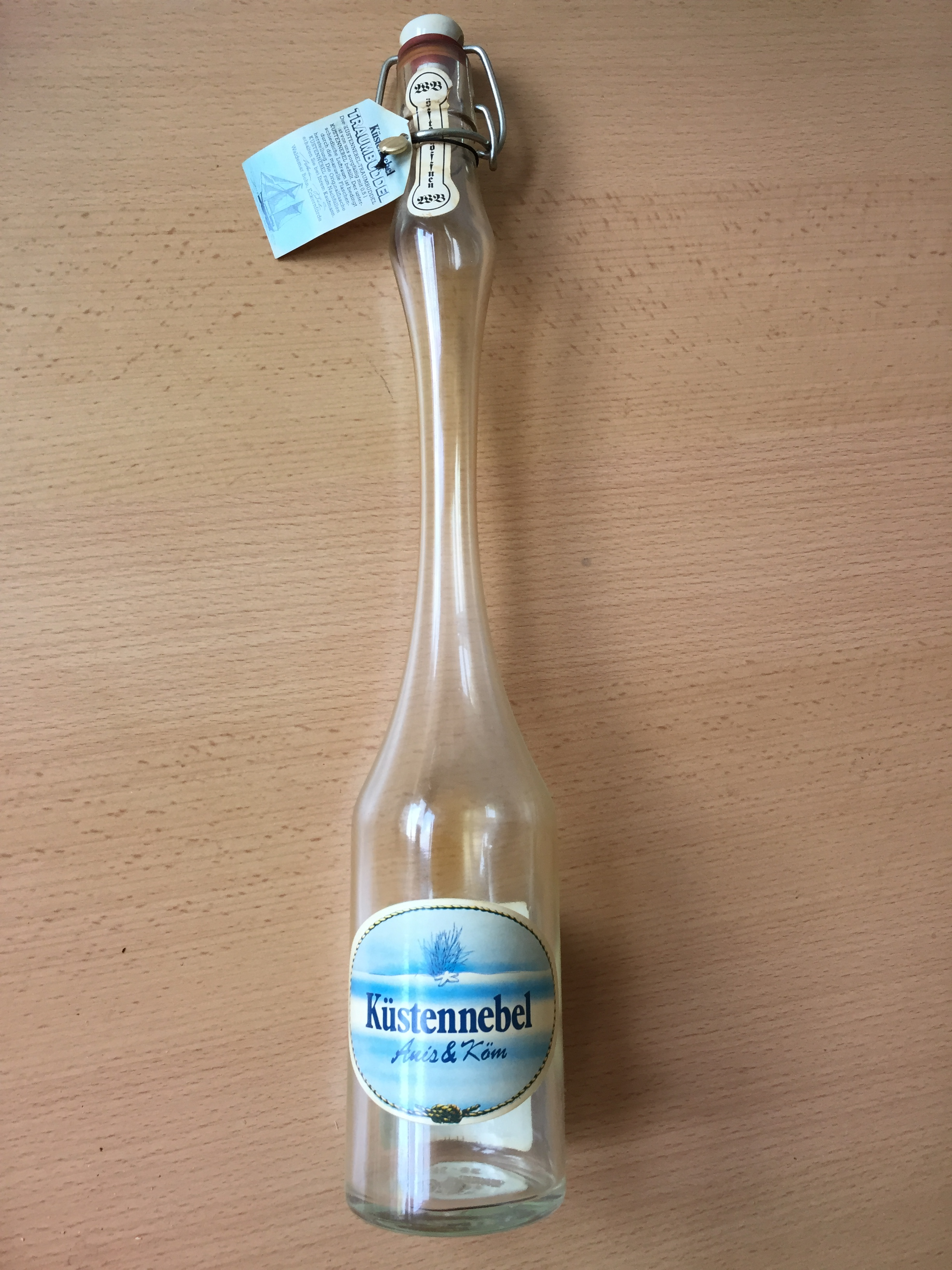 Behn - Küstennebel Traumbuddel